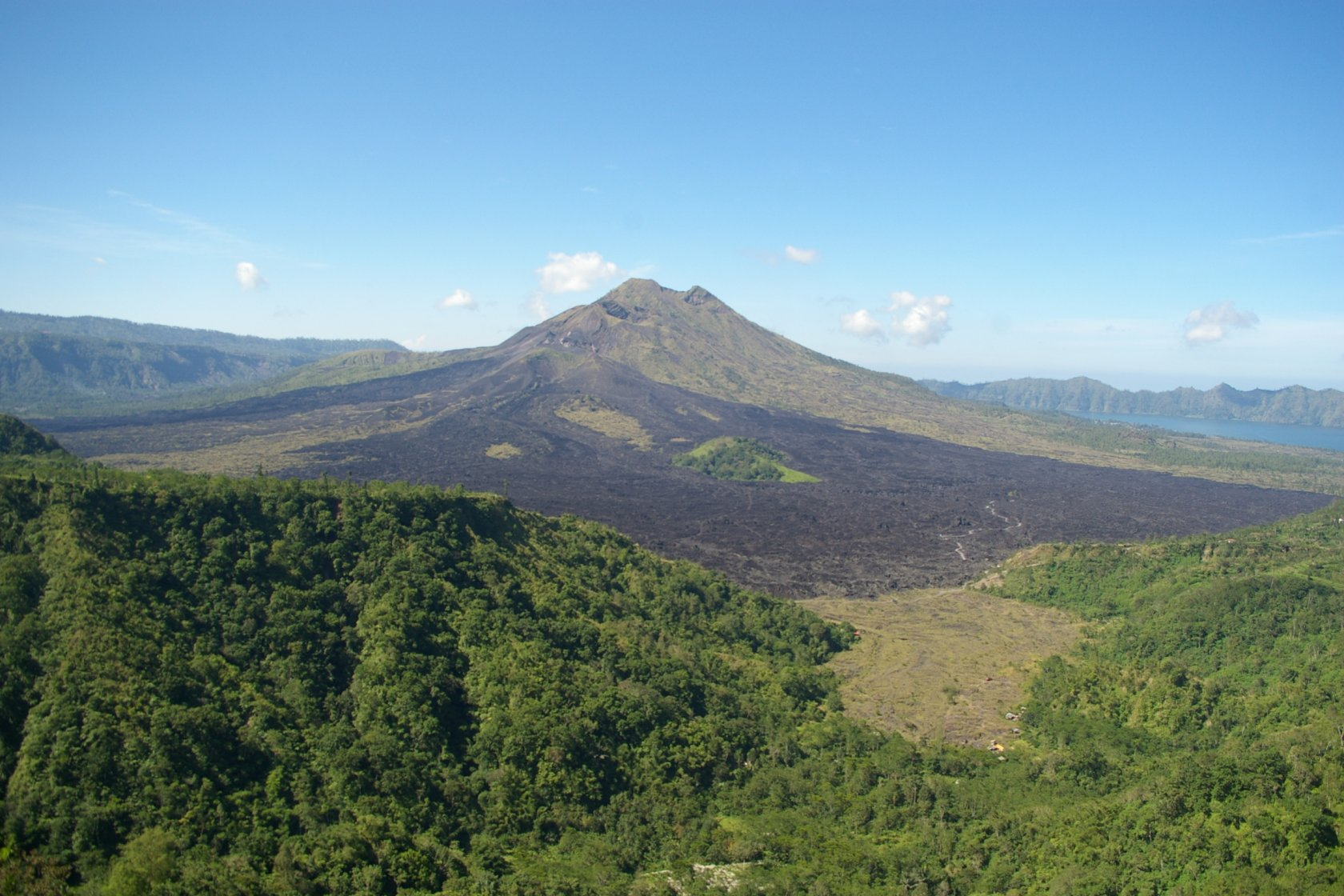 Mount Batur, Bali, Indonesia.